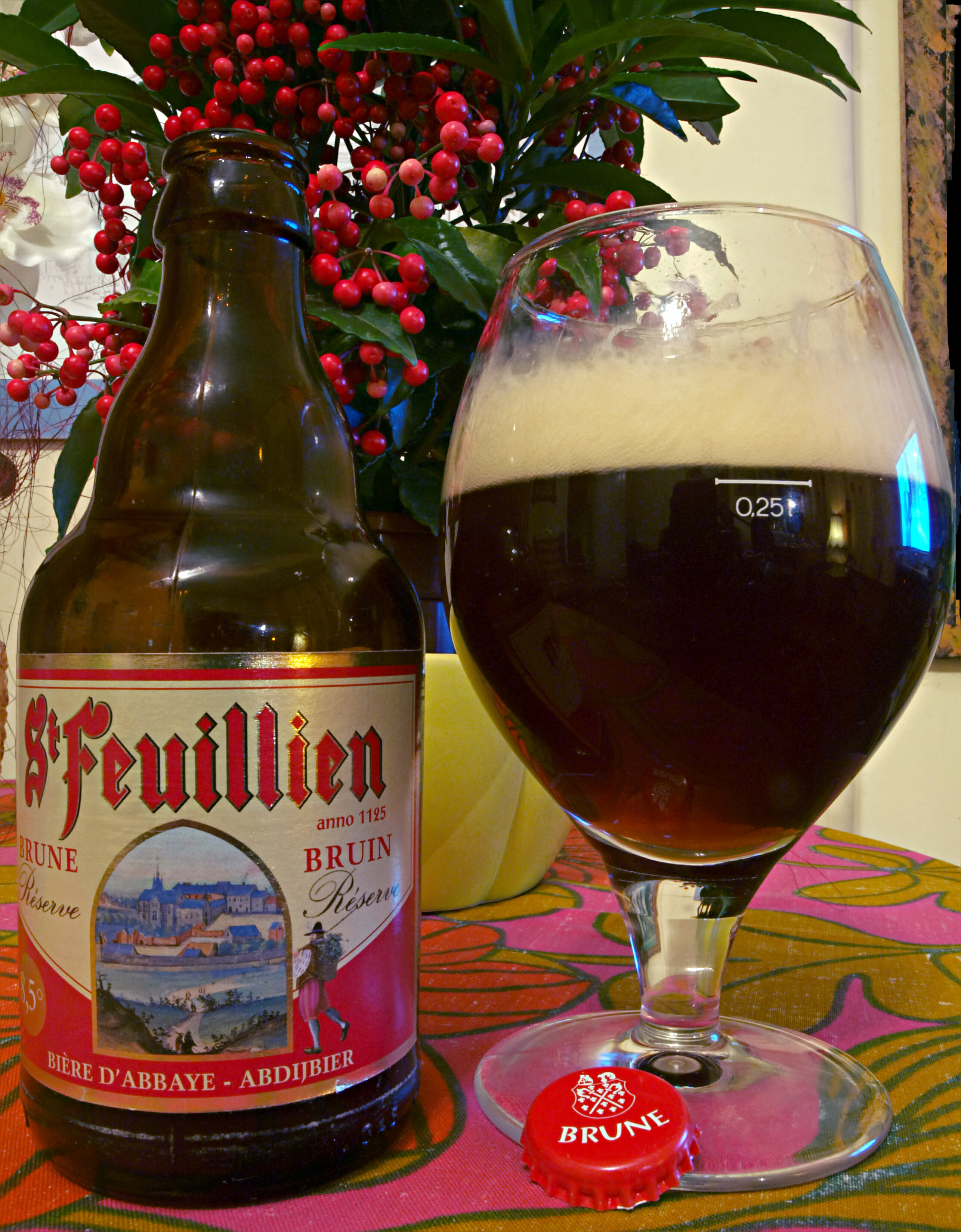 Piwo Belgijskie